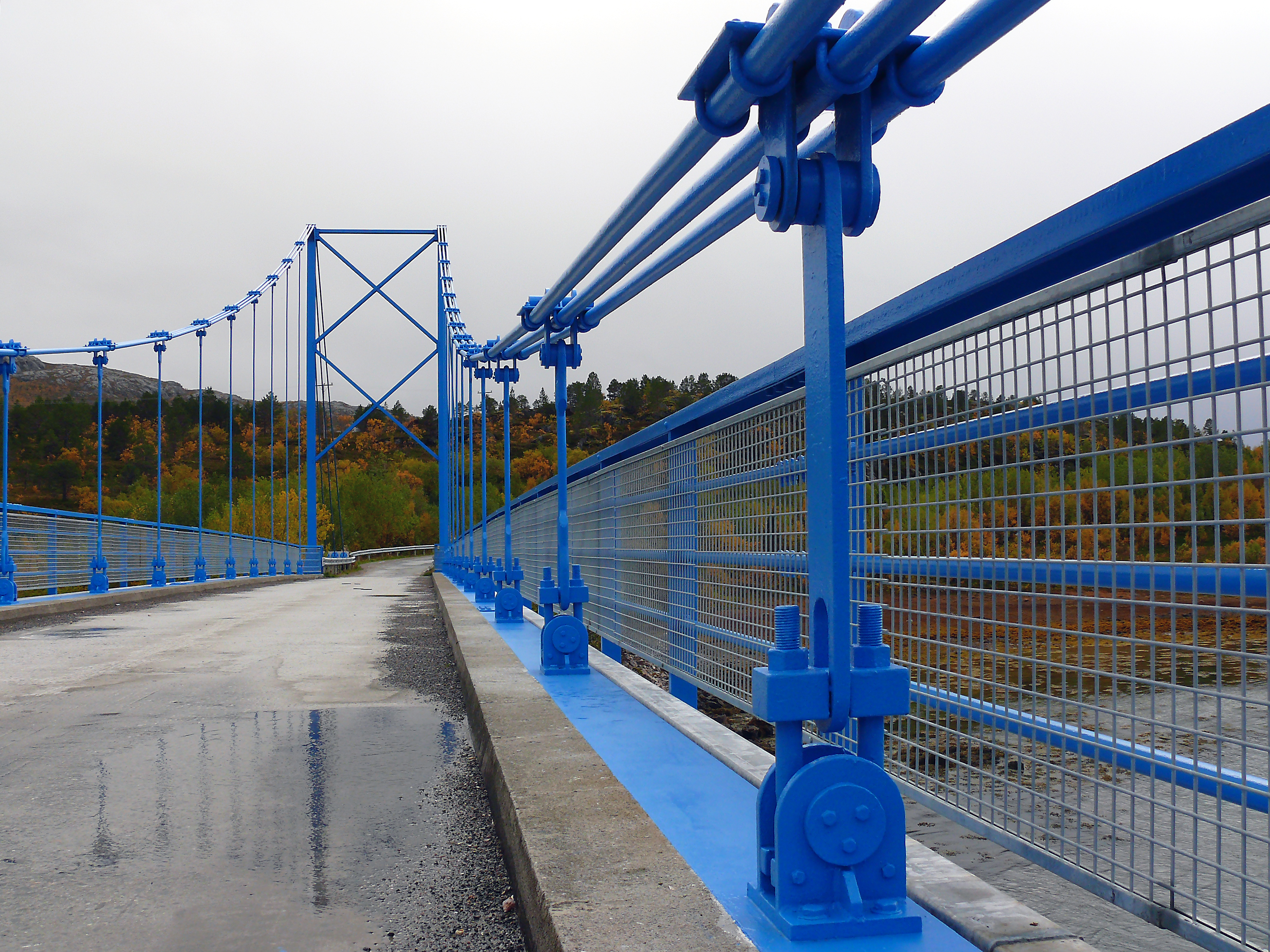 Kjærfjordbrua